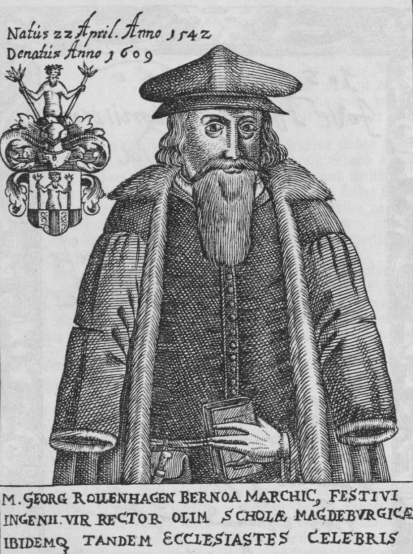 Georg Rollenhagen; Kupferstich